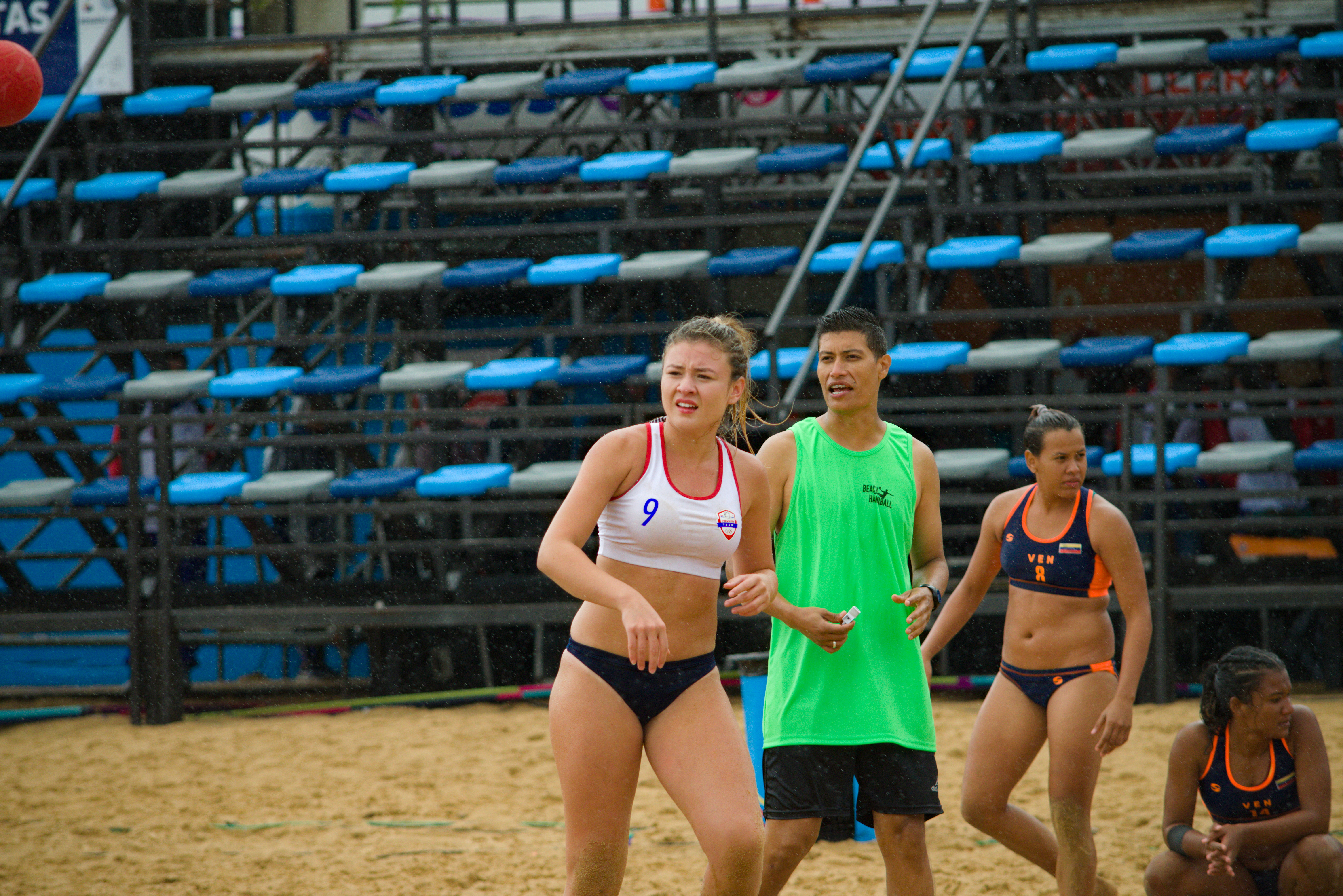 Partido por el tercer lugar categoría femenina de handball entre Paraguay y Venezuela en los Juegos Suramericanos de Playa 2019